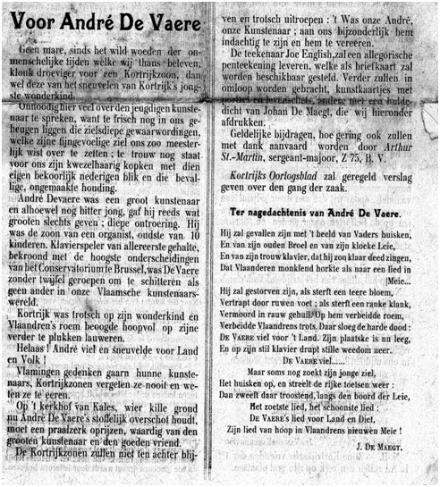 Het Kortrijks Oorlogsblad nr. 7 - juli 1918 p.1